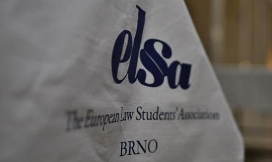 Logo organizace ELSA Brno